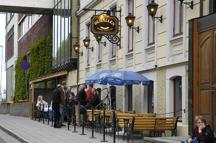 Tromsøs eldste og mest tradisjonsrike pub. Foto: Krister Brandser